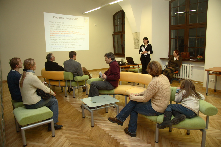 VU bibliotekos Humanistikos informacijos centras